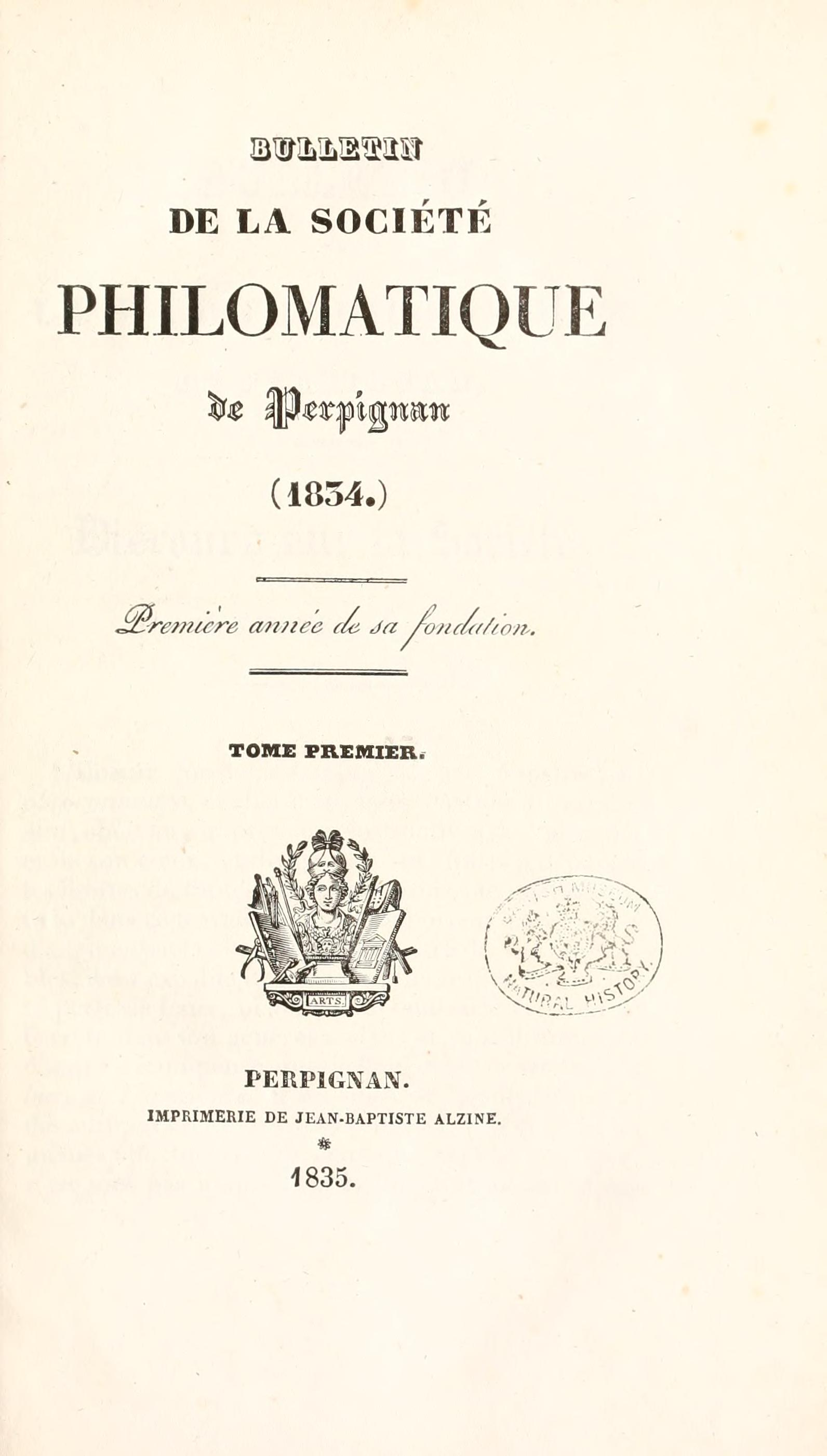 Bulletin de la Societe Philomathique de Perpignan.